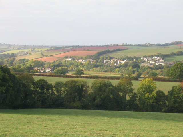 Yeoford village